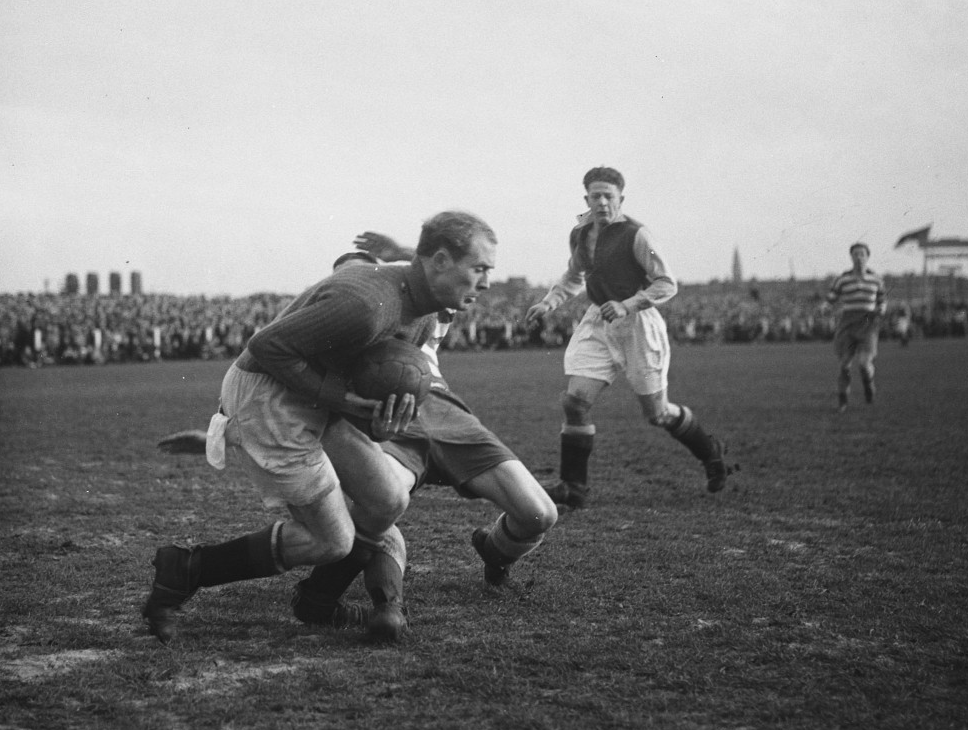 Xerxes tegen Ajax 2-1. Keeper Leentvaar (Ajax) redt.